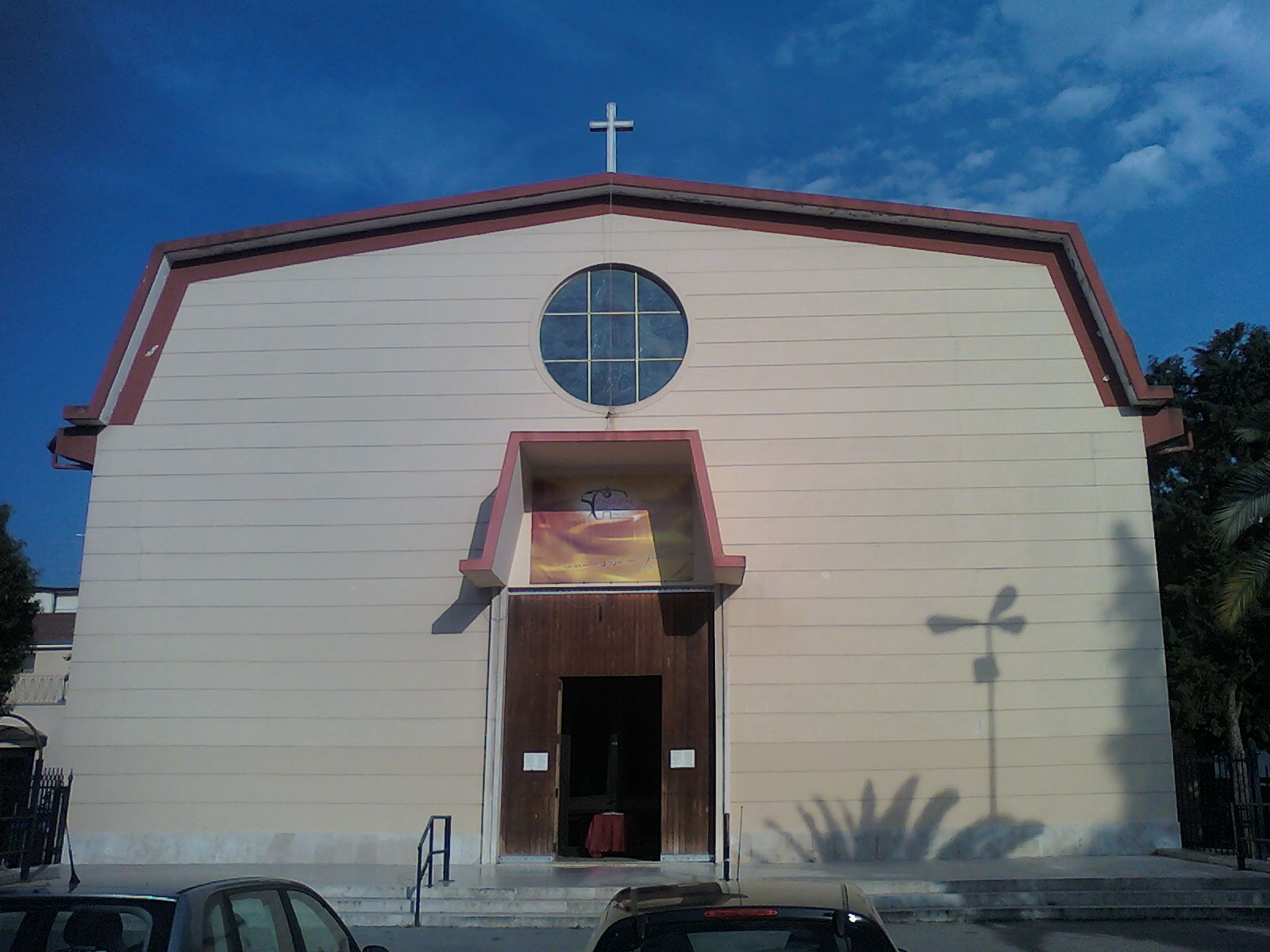 Chiesa di San Pio X a Foggia, foto scattata da me